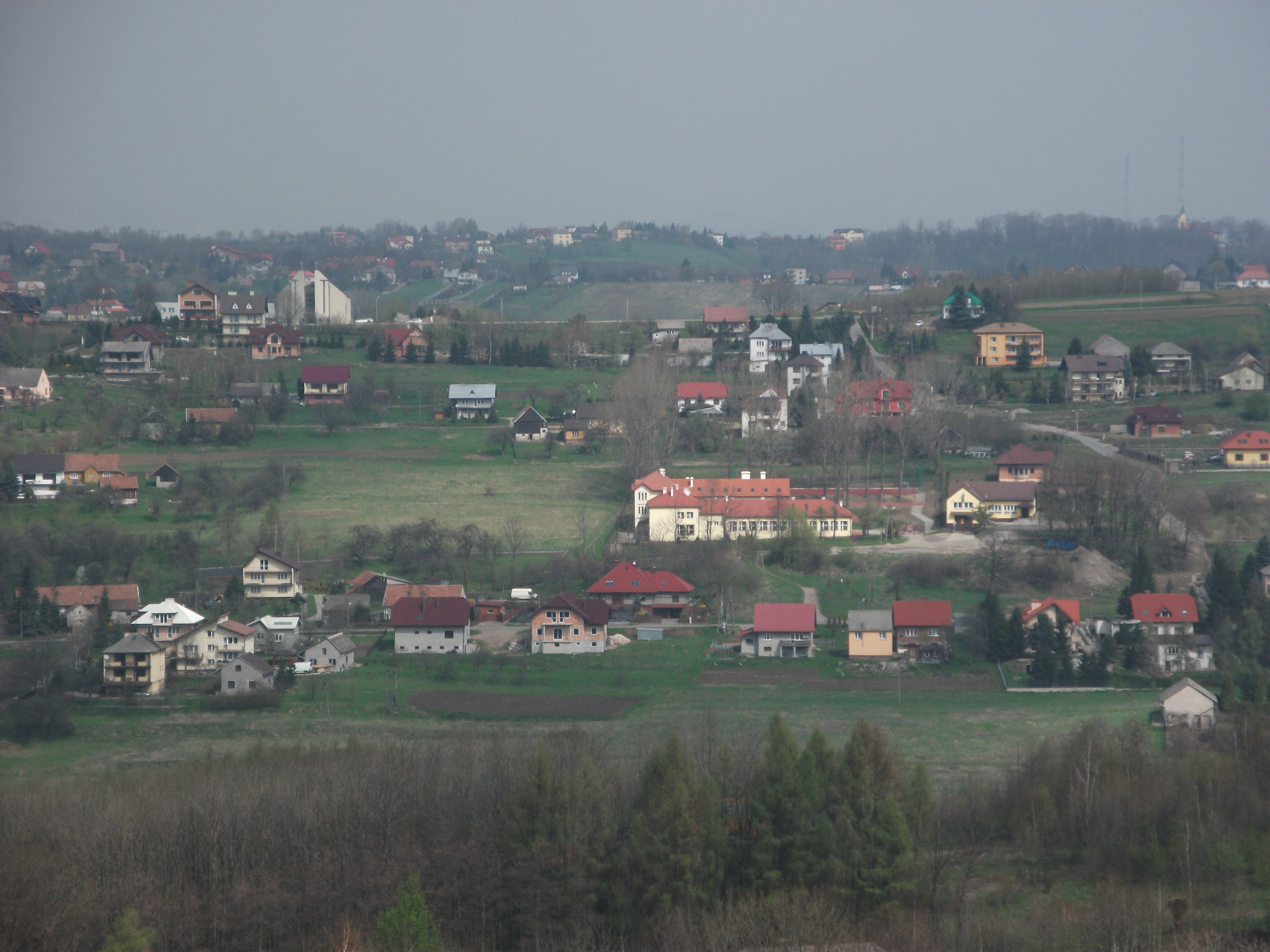 Na zdjęciu znajduje się szkoła oraz kościół pw. Matki Bożej Fatimskiej.